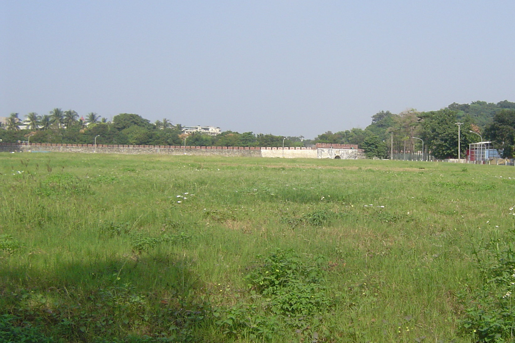 高雄市左營區鳳山縣舊城東門及城牆。